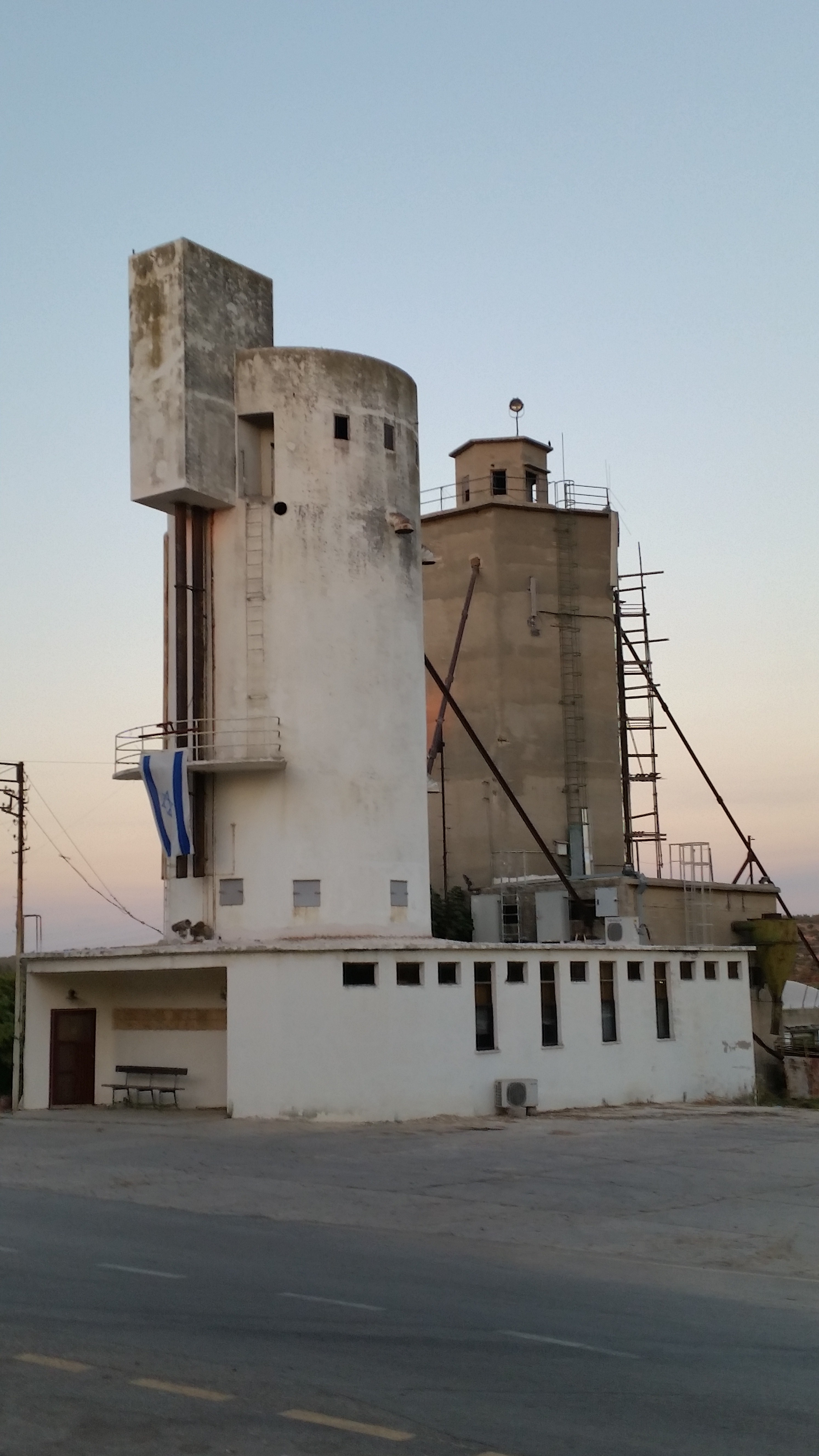 מגדלי הסילו המשמשים מותג לישוב